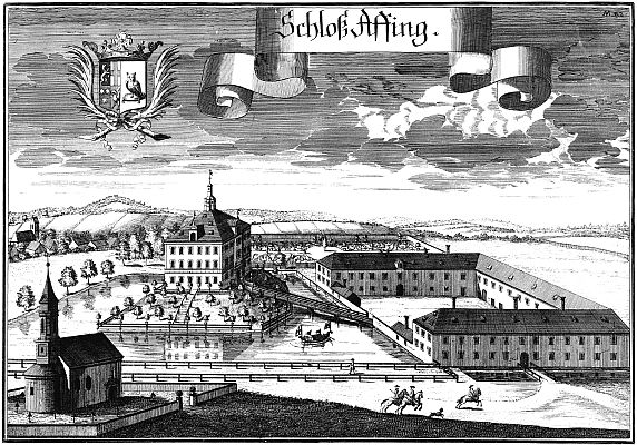 Schloss Affing // Kupferstich von Michael Wening (1645 - 1718)